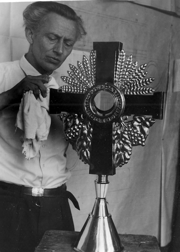 Monstranz, gefertigt vom Metall- und Steinbildhauer Ernst Hanssen (*1907,+1989)